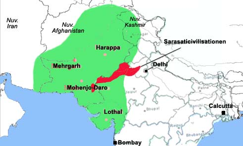 Induscivilisationen, montage gjort med karta från franska Wikipedia som grund